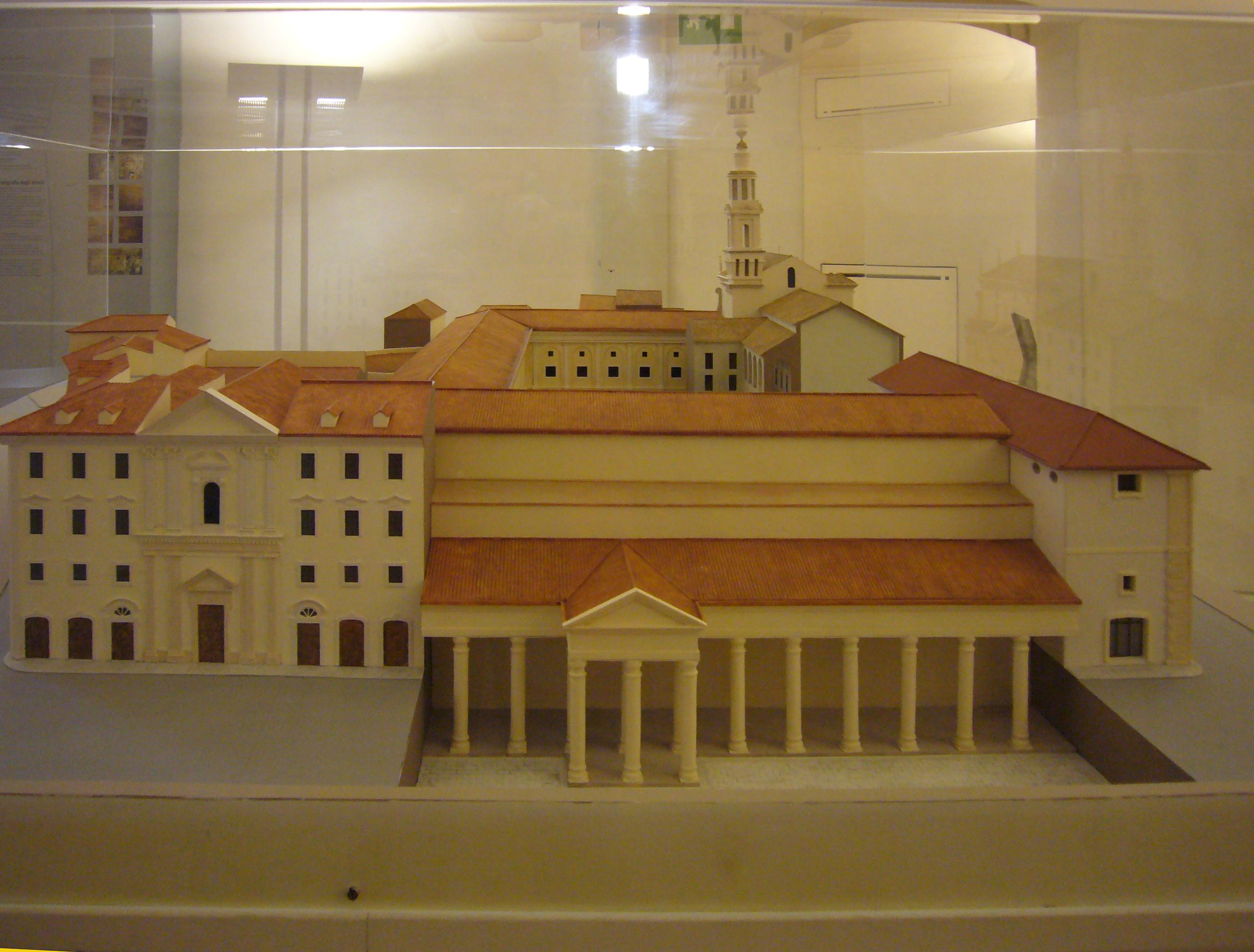 Roma, Crypta Balbi: maquette illustrativa dell'evoluzione del sito del complesso dal lato di via delle Botteghe Oscure. Sulla sinistra, la chiesa di S. Stanislao dei Polacchi (XVIII). Sulla destra, evidenziati gli edifici del portico antichi, ad un livello più basso dell'attuale sede stradale.